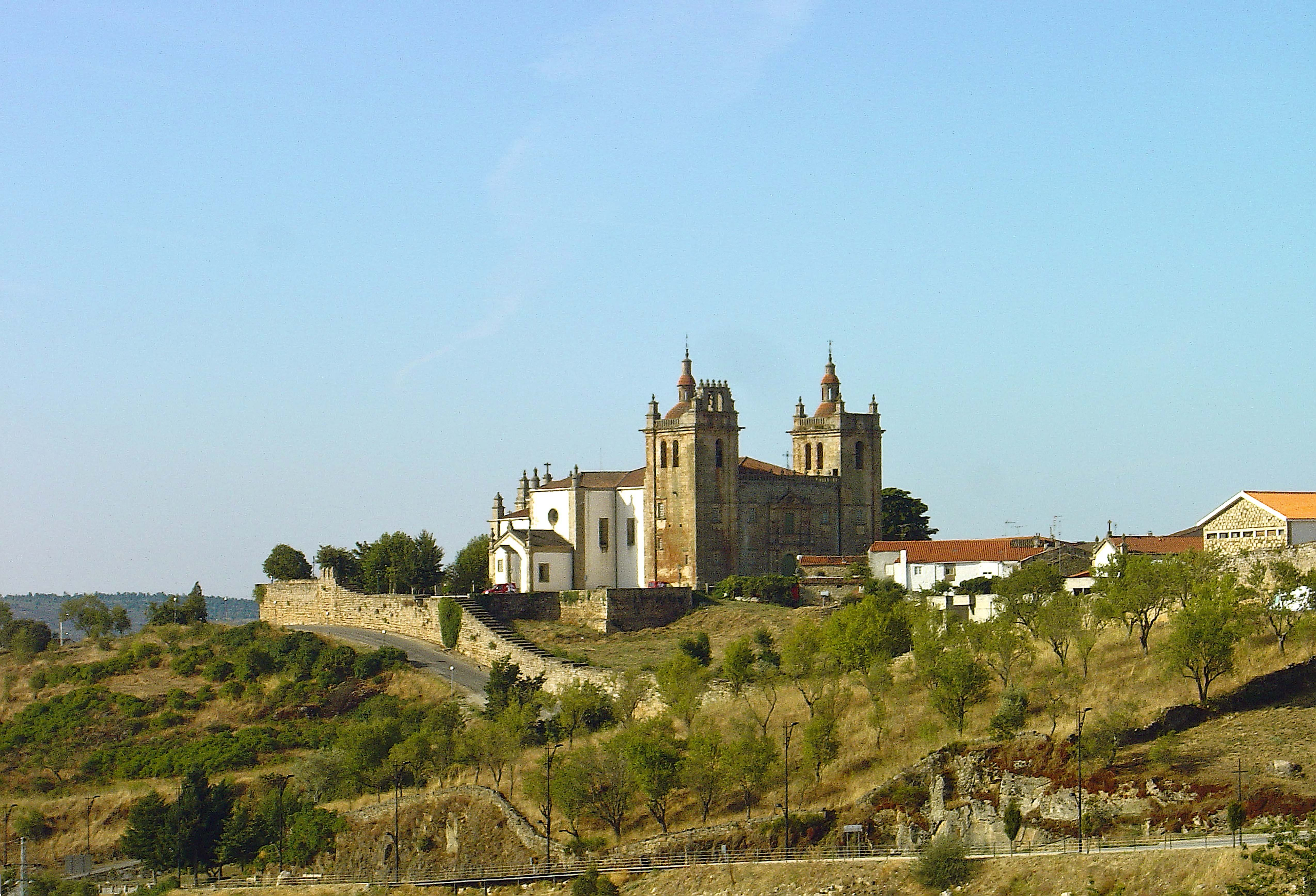 A Sé Catedral de Miranda do Douro é uma edificação maneirista, cuja traça se deve ao arquitecto Miguel de Arruda, embora as obras se tenham iniciado sob a orientação do arquitecto bragançano Pero de la Faia. A primeira pedra terá sido lançada em 1552, mas a conclusão da obra verificou-se já no período filipino. Orientado a sul, o templo tem planta cruciforme, com o transepto semelhante às naves. A fachada principal, em cantaria, mostra duas enormes torres que acentuam a verticalidade do imóvel. O pórtico renascença, de arco pleno, é encimado por um janelão moldurado de motivos geométricos. Estes dois vãos são ladeados por dois pares de colunas finas, que, no registo superior, emolduram dois nichos. Sobre esta composição axial inscreve-se um discreto frontão. A fachada possui ainda quatro janelas de verga recta, duas em cada registo. Ao alto, entre as duas torres, corre uma balaustrada. As duas torres que ladeiam a fachada dividem-se em três registos. Nos dois primeiros abrem-se janelas semelhantes às atrás descritas, enquanto no terceiro se abre uma ventana para sino. Por cima da cornija foi erigido um campanário. See where this picture was taken. [?]